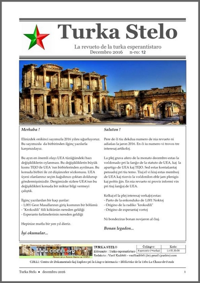 Turka-Stelo #12 decembro 2016